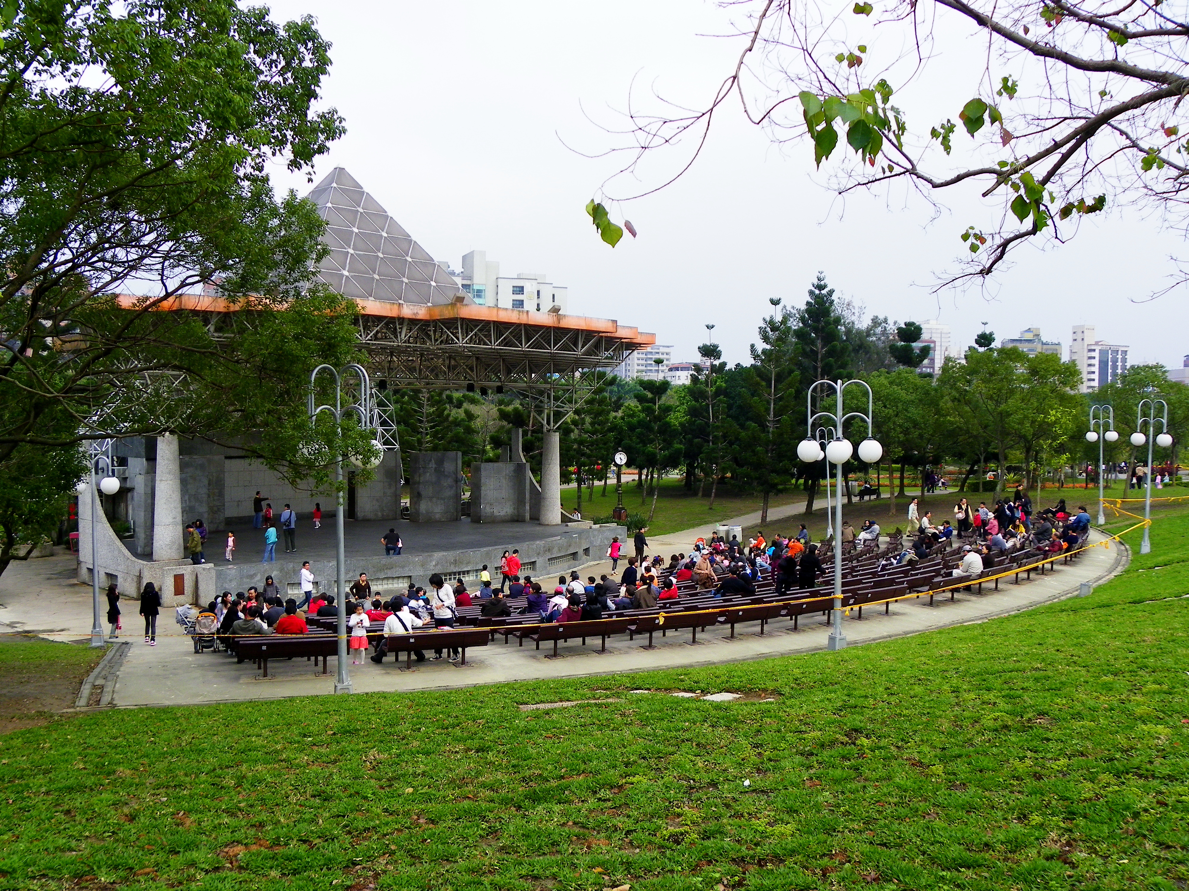 大安森林公園中央的露天音樂臺。